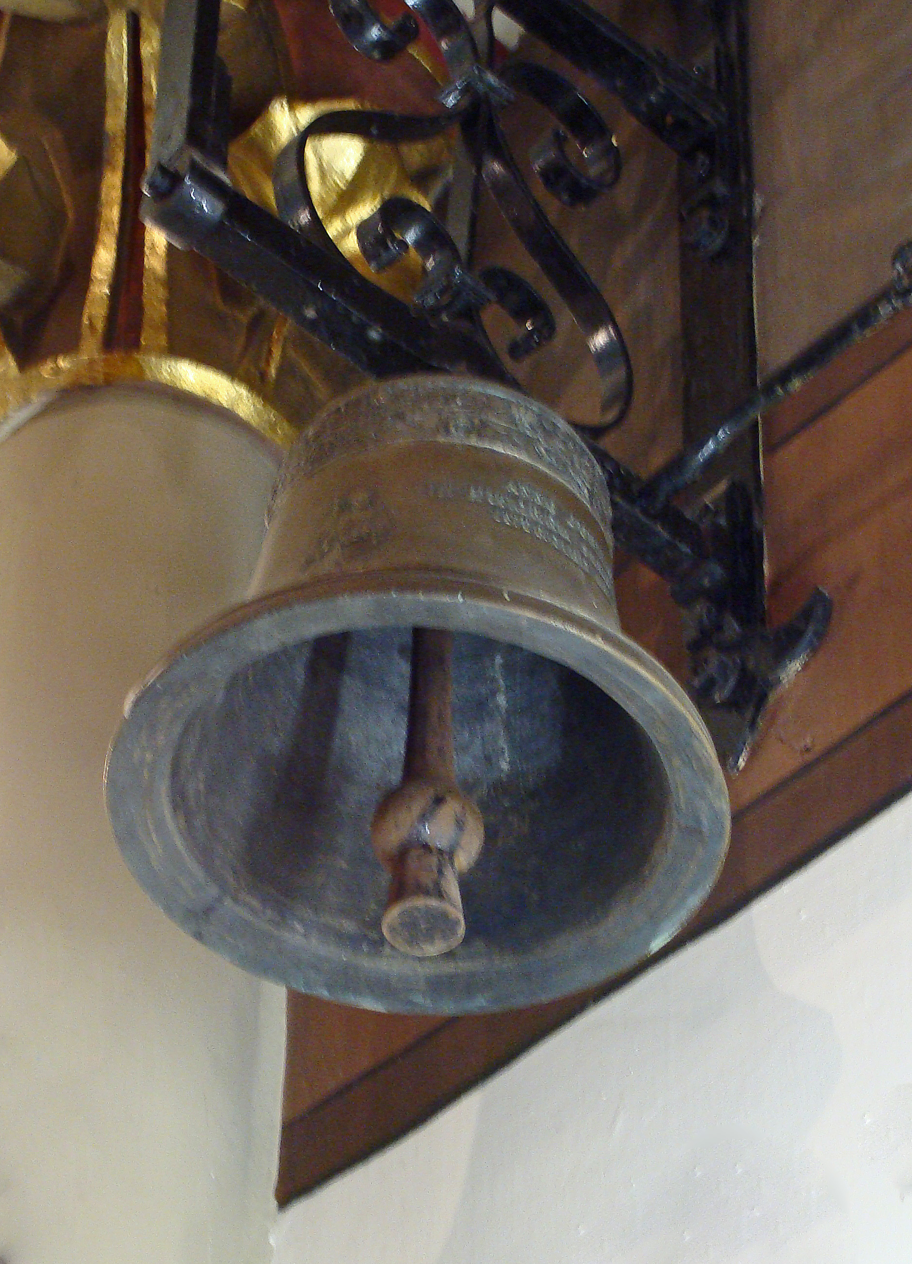 église de L'Hôpital, cloche Saint Tarcisius martyr, cloche du choeur, 16kg, tonalité: Do.